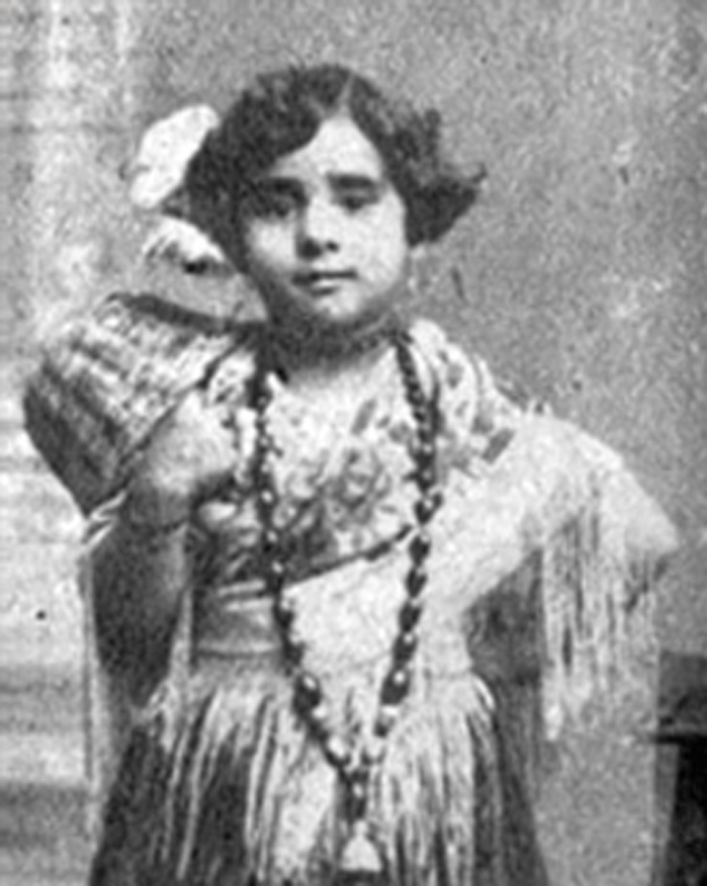 Lola Flores de niña (Aproximadamente hacia 1930)